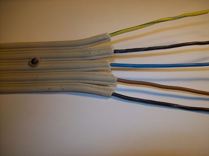 Ein Stück alte Stegleitung aus einer Hausinstallation.